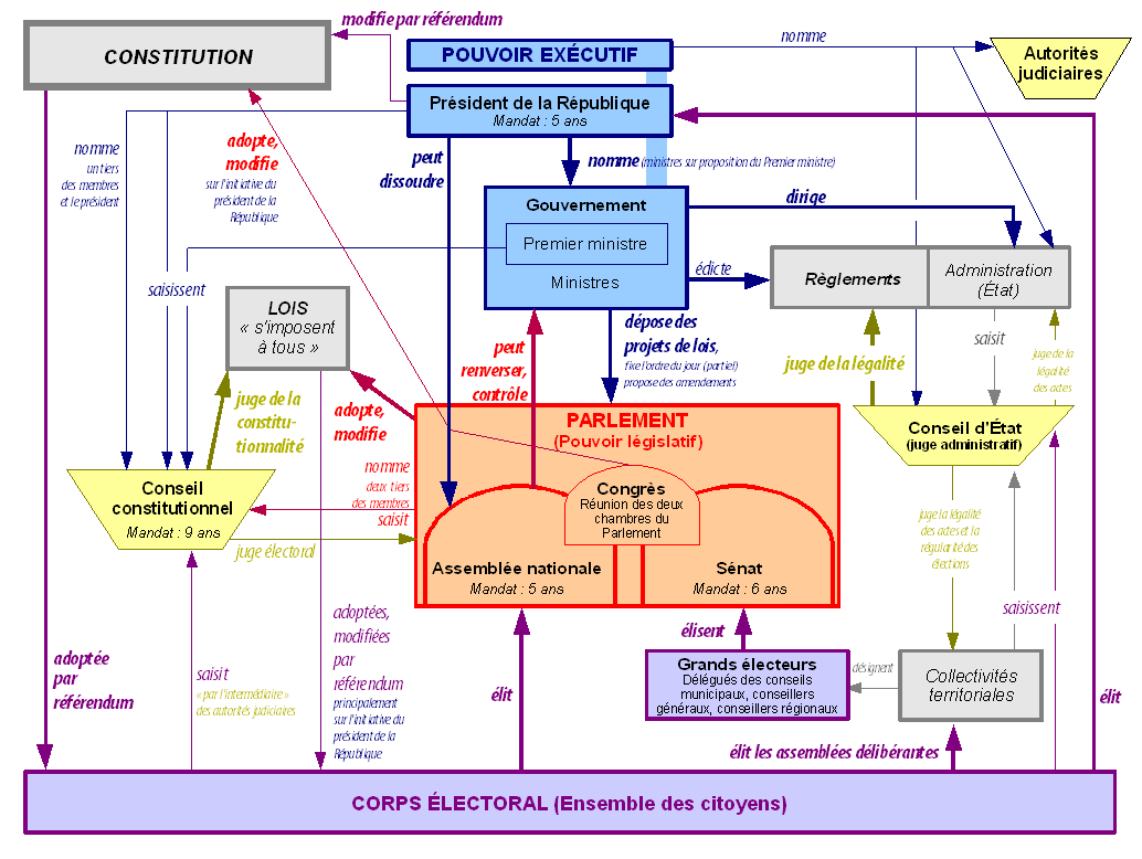 Schéma simplifié de l'organisation et de l'équilibre des pouvoirs sous la Ve République (France) - décembre 2008